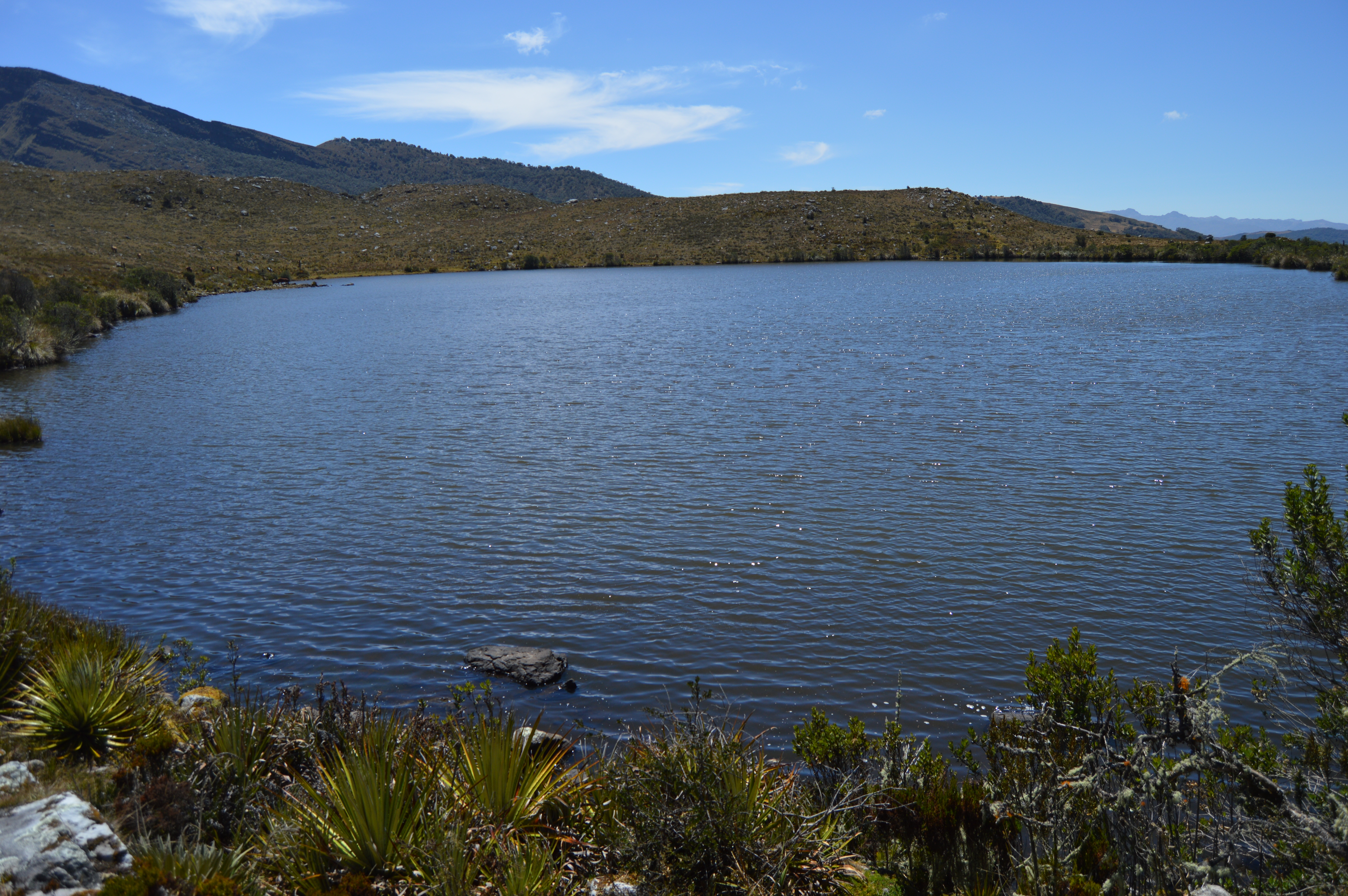 Esta fotografía fue tomada en un área protegida de Colombia con el código 82 del RUNAP.